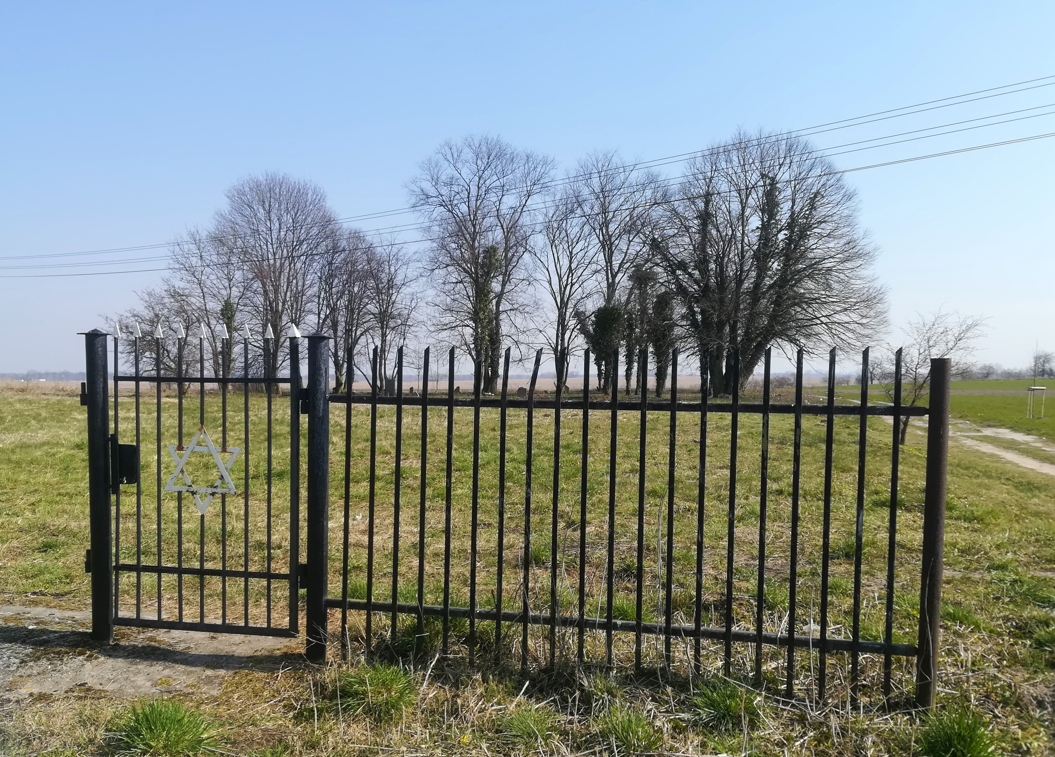 Cmentarz żydowski w Buku.